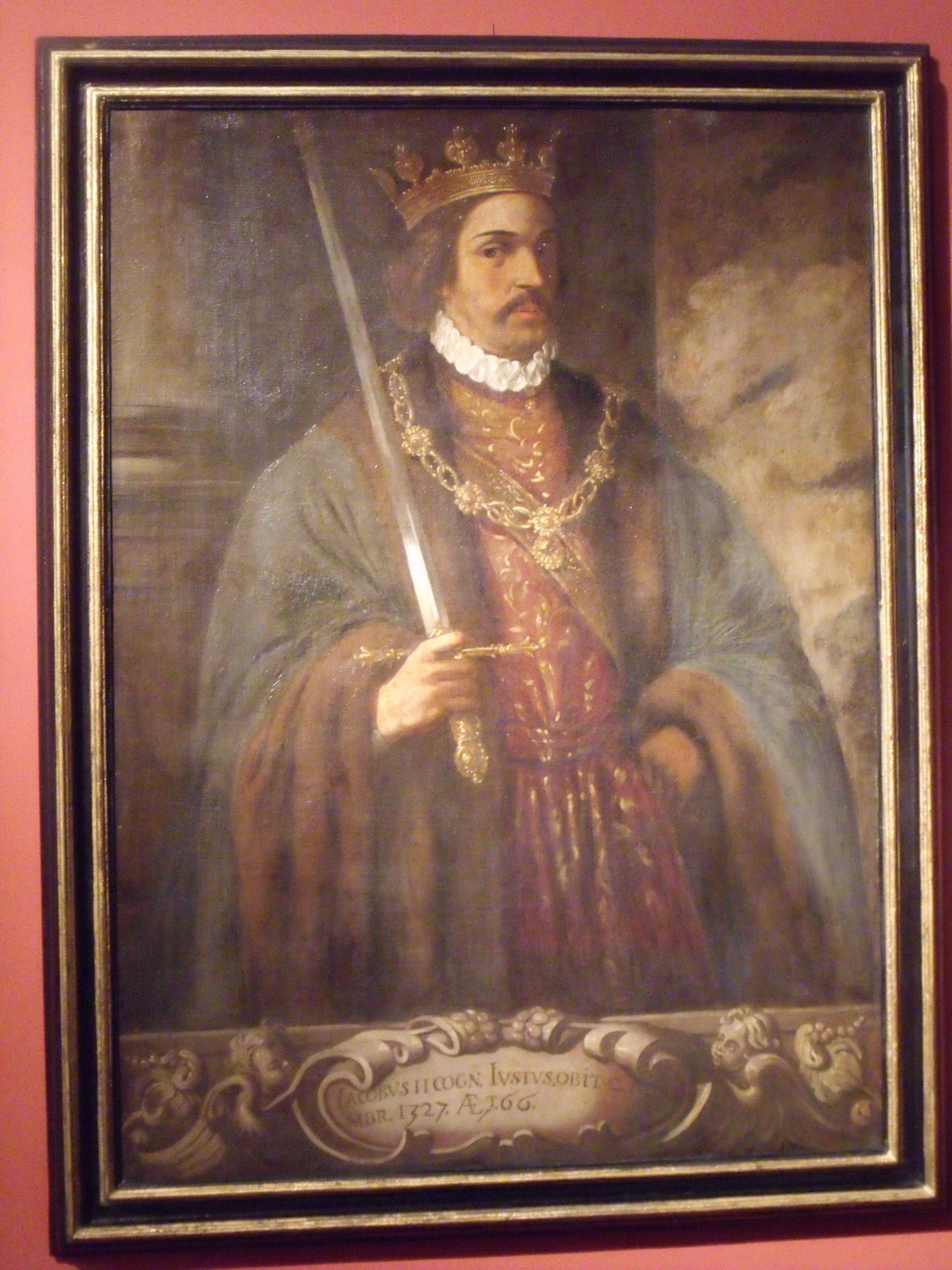 Palau de la Generalitat Valenciana